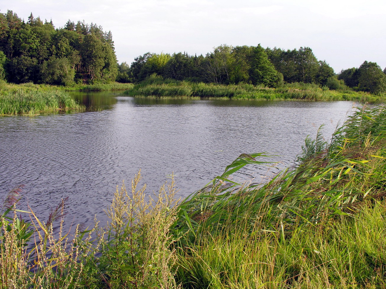 Virvytės (viršuje, kairėje) ir Ventos santaka ties Santekliais, Mažeikių raj., Viekšnių seniūnijoje Foto: Algirdas, 2006 m. rugpjūčio 11 d., Lietuva